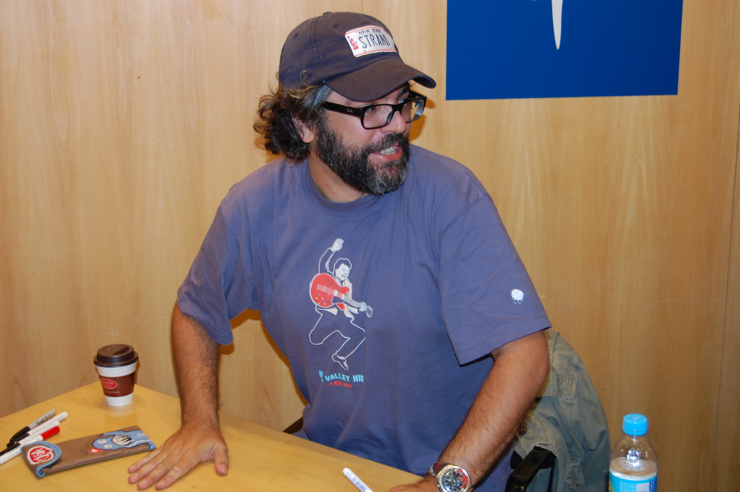 Ricardo Siri Liniers en la Feria Internacional del Libro de Buenos Aires 2013, firmando autógrafos.